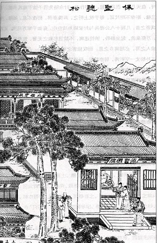 保圣听松 此图刻于1890年